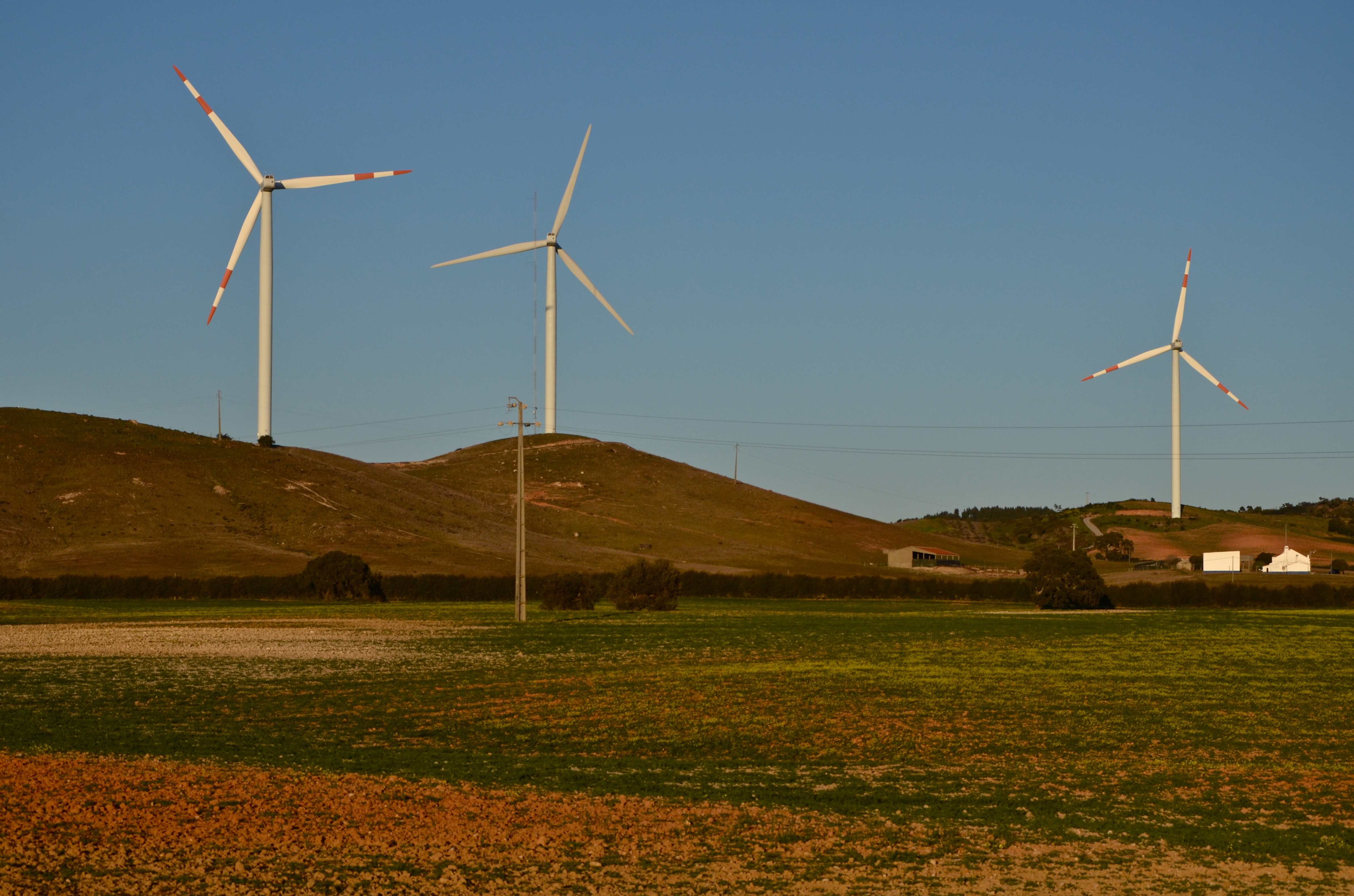 vento a triplicar